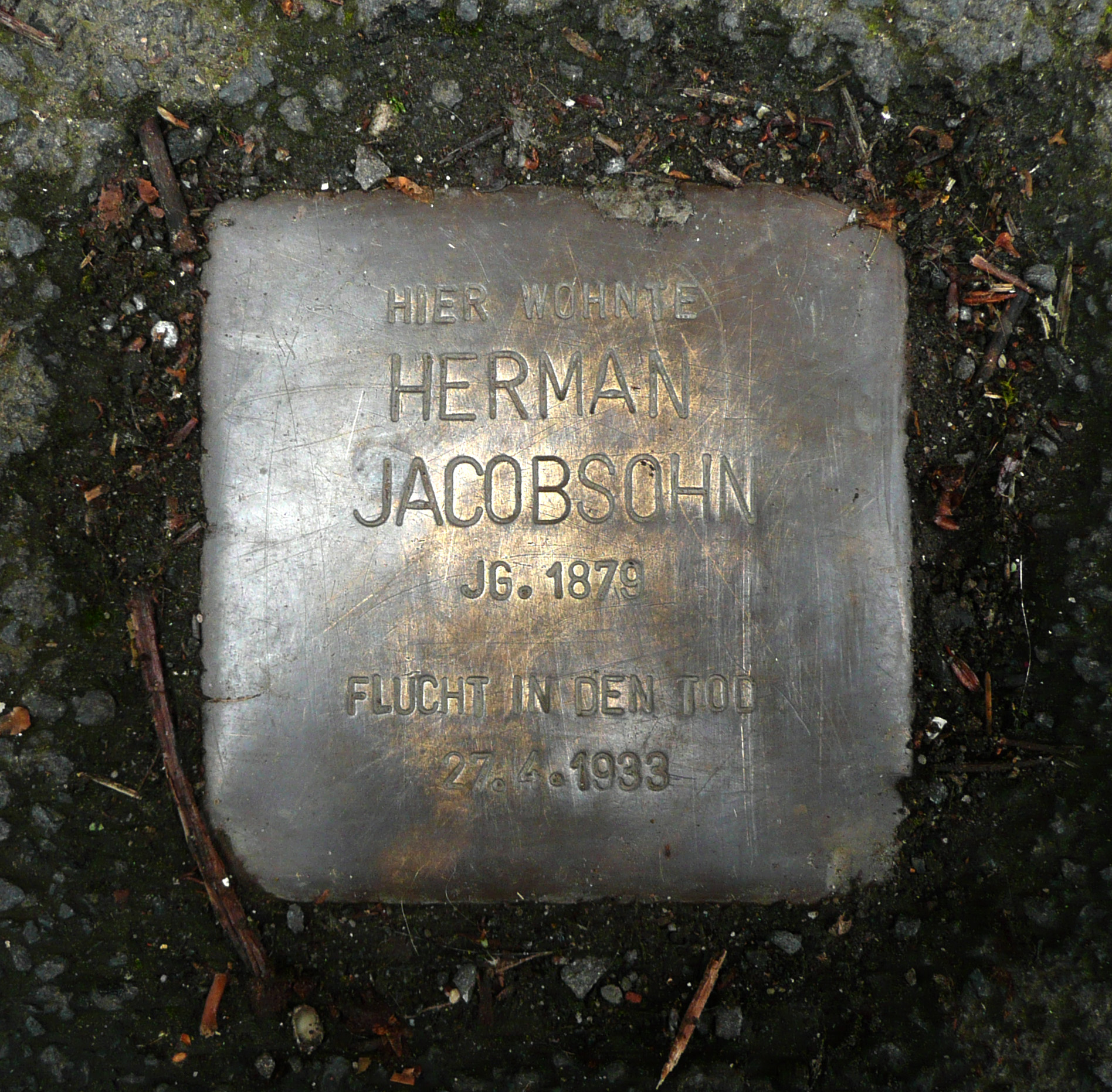 Stolperstein für Hermann Jacobsohn in der Schückingstraße 24 in Marburg. Inschrift: Herman Jacobsohn, JG. 1879, Flucht in den Tod 27.4.1933